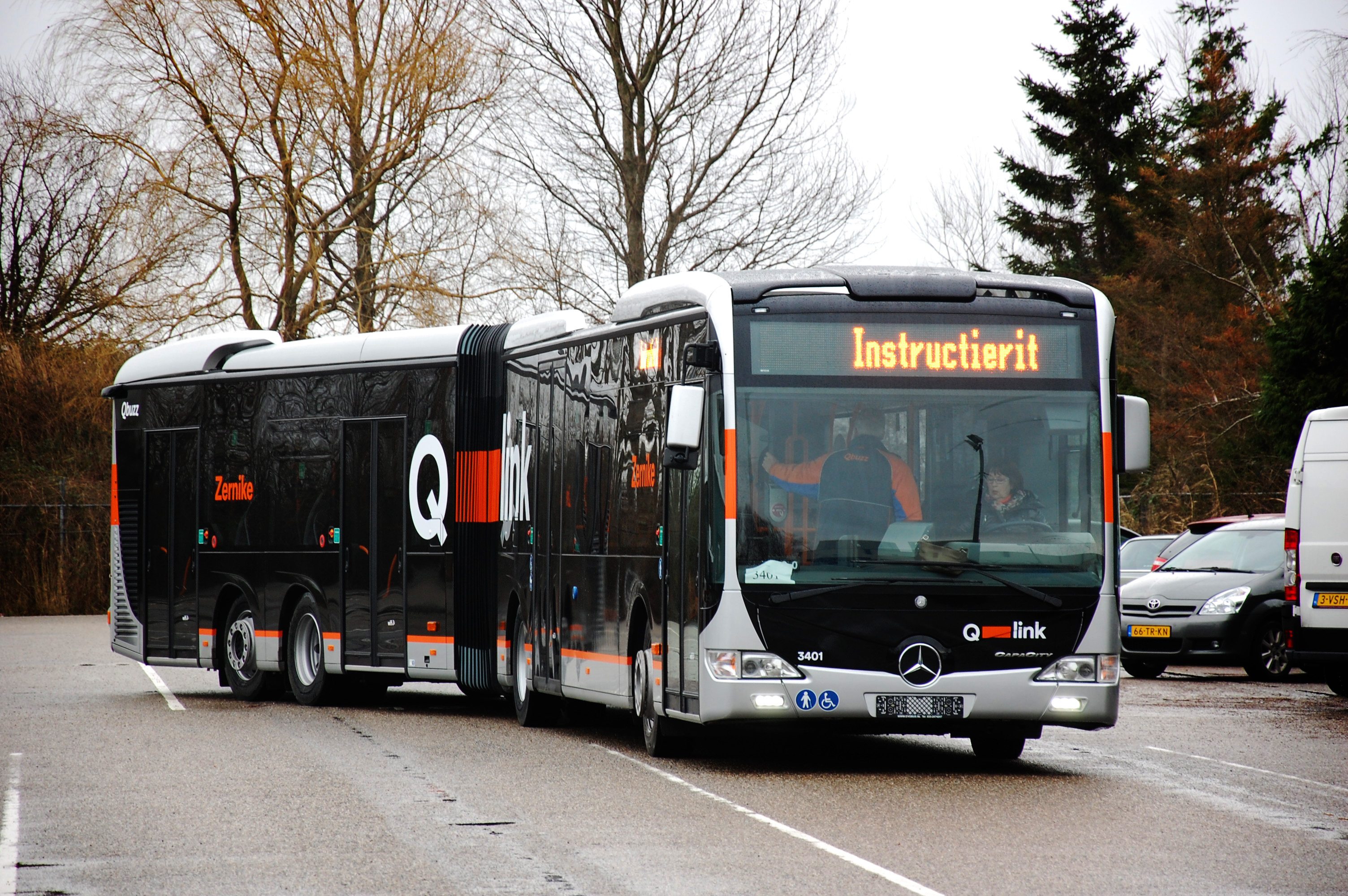 Een Mercedes-Benz CapaCity in metrodesign bestemd voor Qlink-netwerk in Groningen. Eerste CapaCity-bussen in Nederlandse dienst.